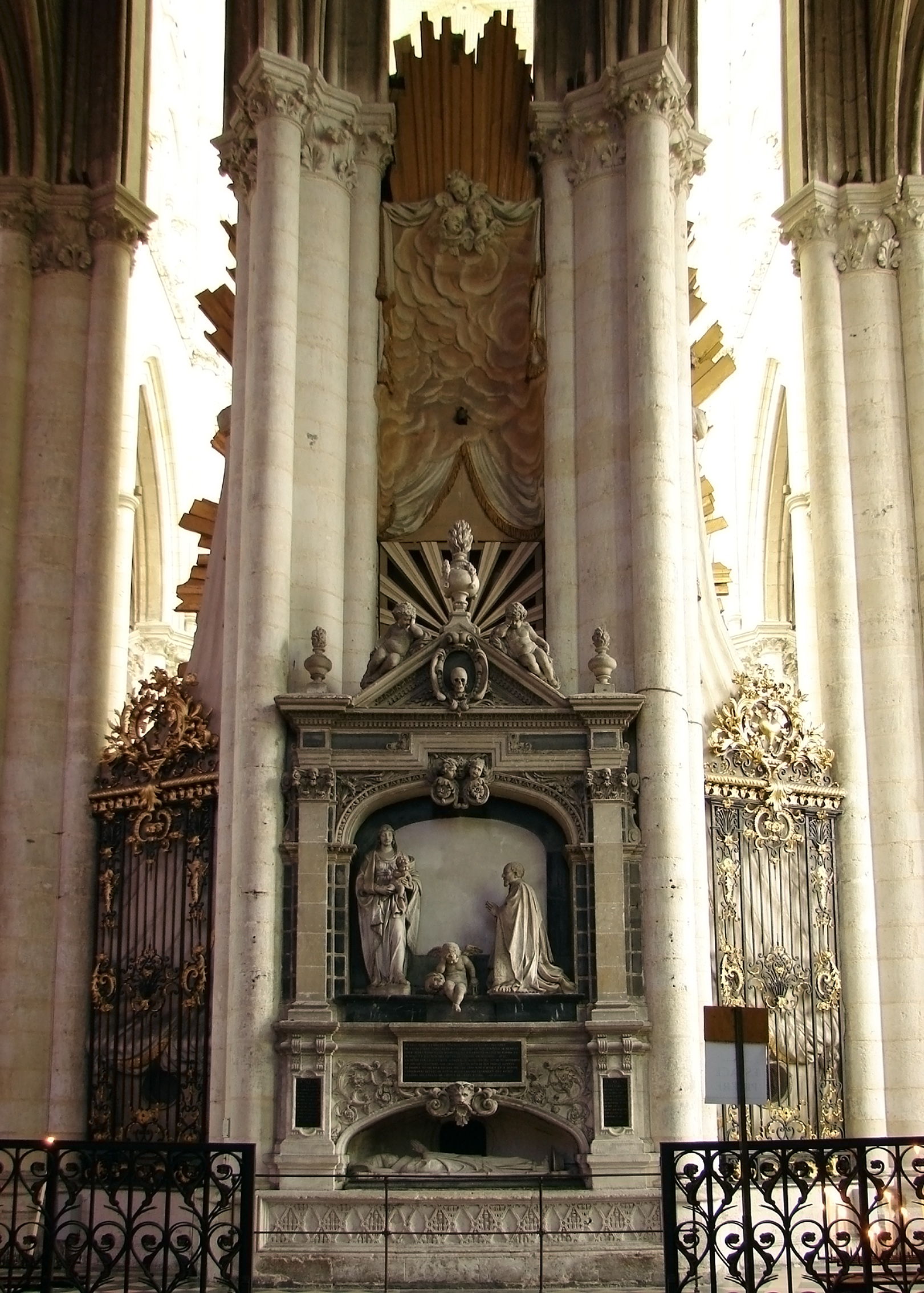 Le tombeau du chanoine Guilain Lucas, 1ère moitié du 17ème siècle, au revers du maître-autel dans la cathédrale d'Amiens.Œuvre de Nicolas Blasset. Latéralement on peut voir les superbes grilles de Jean Veyren. À l'arrière-plan : vue du revers de la Gloire eucharistique qui entoure le maître-autel. Au-dessous du tombeau de Lucas, gisant du cardinal Jean de la Grange, évêque d'Amiens, abrité sous l'ancien enfeu présumé de l'évêque Arnould de la Pierre.